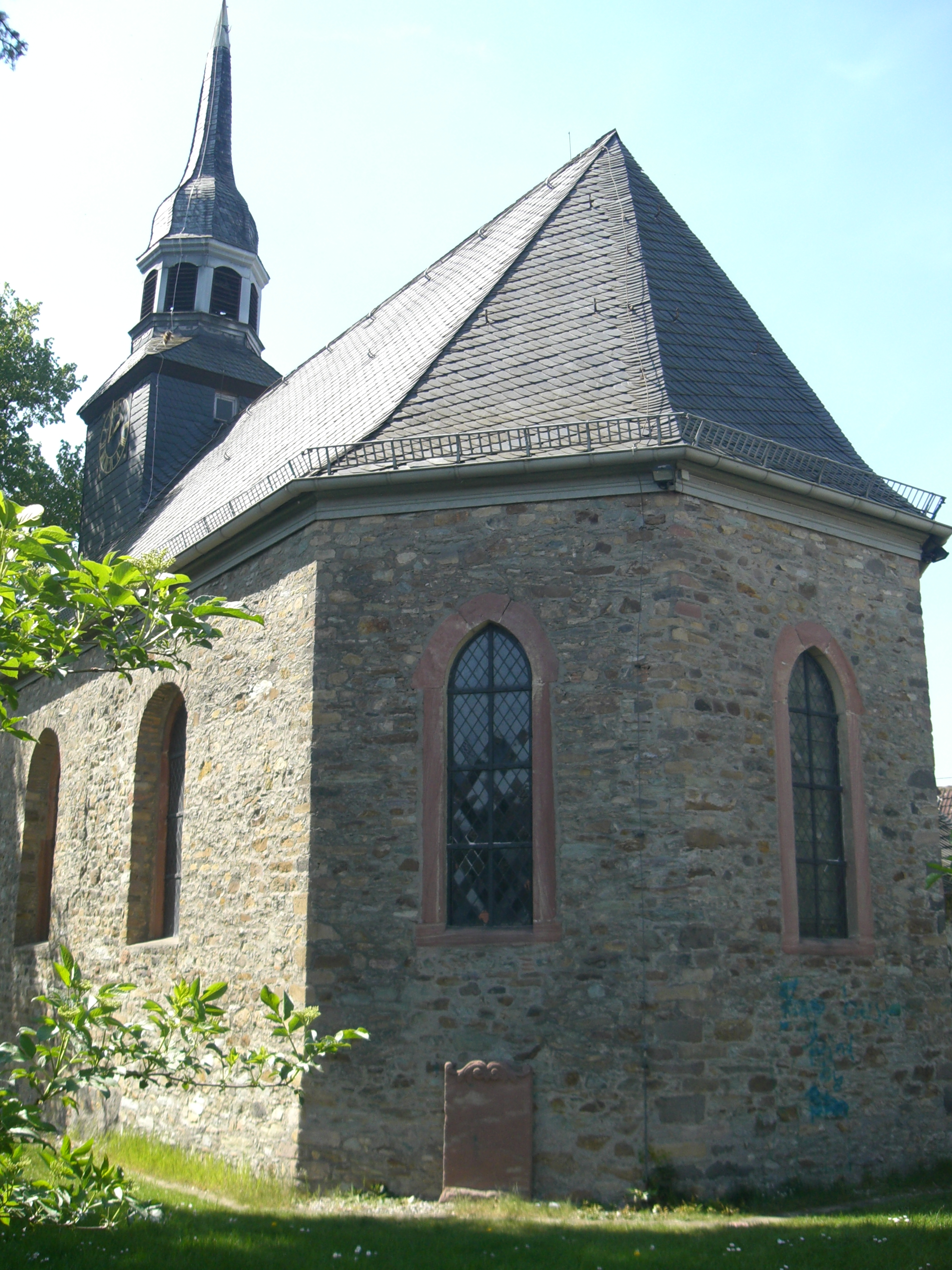 St. Georgskirche Steinbach Taunus 61449 Ost Süd Seite